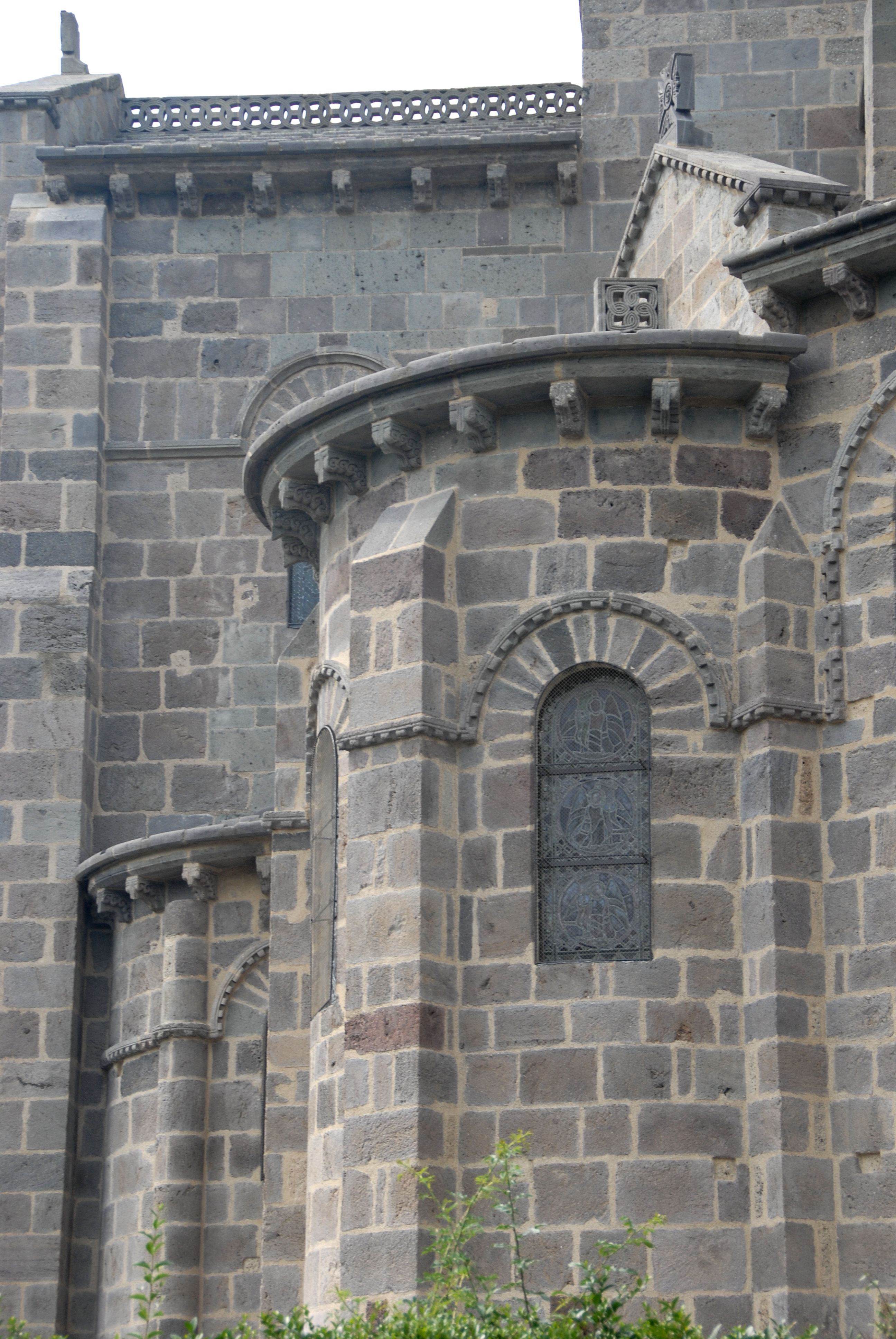 St.-Nectaire, südliche Umgangskapelle